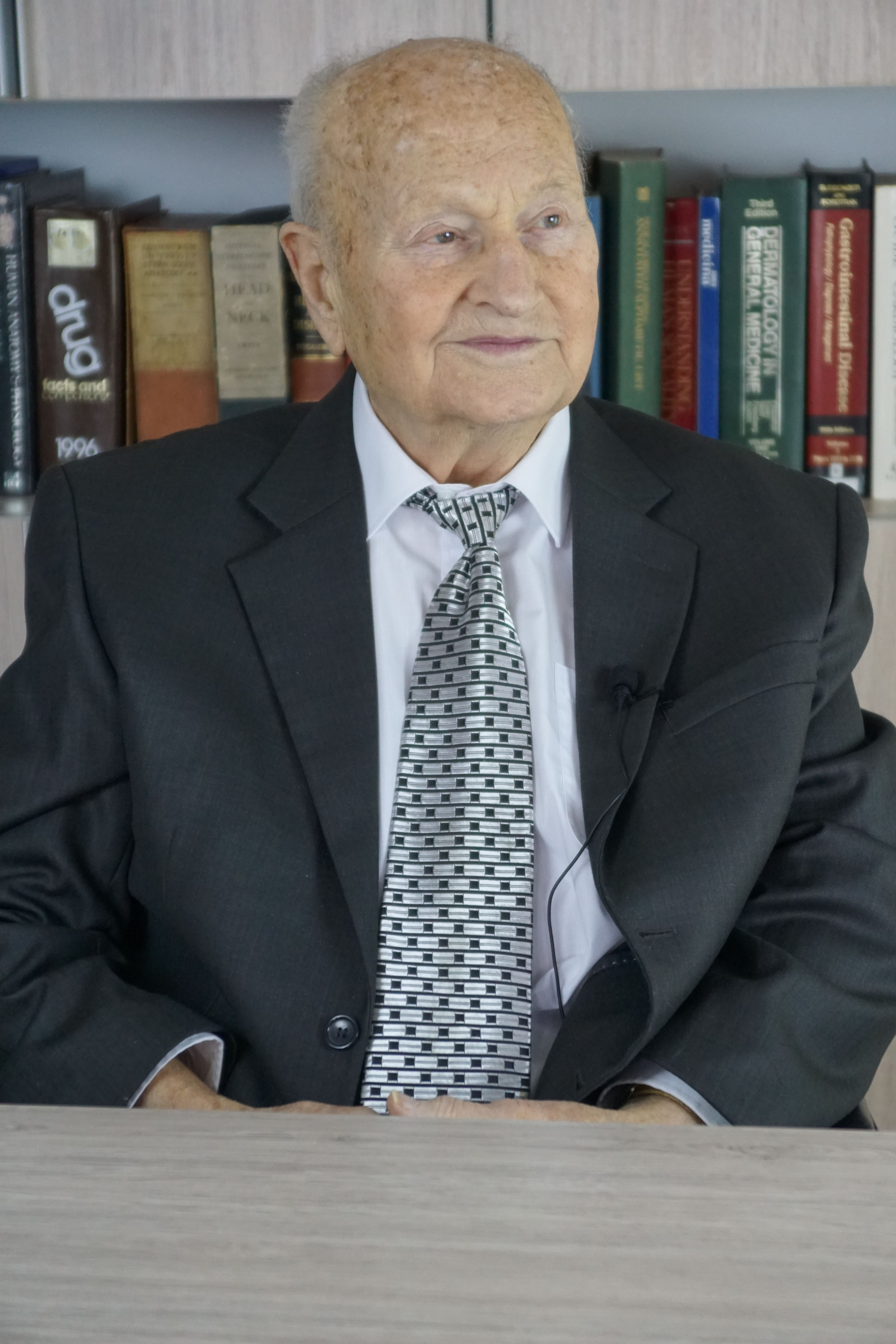 Портрет Ю.Ю.Бредикиса